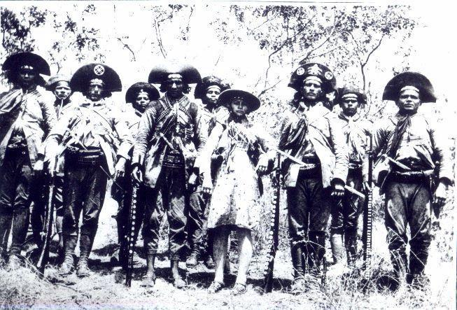 Retratos do cangaço - Virgulino Ferreira, Lampião